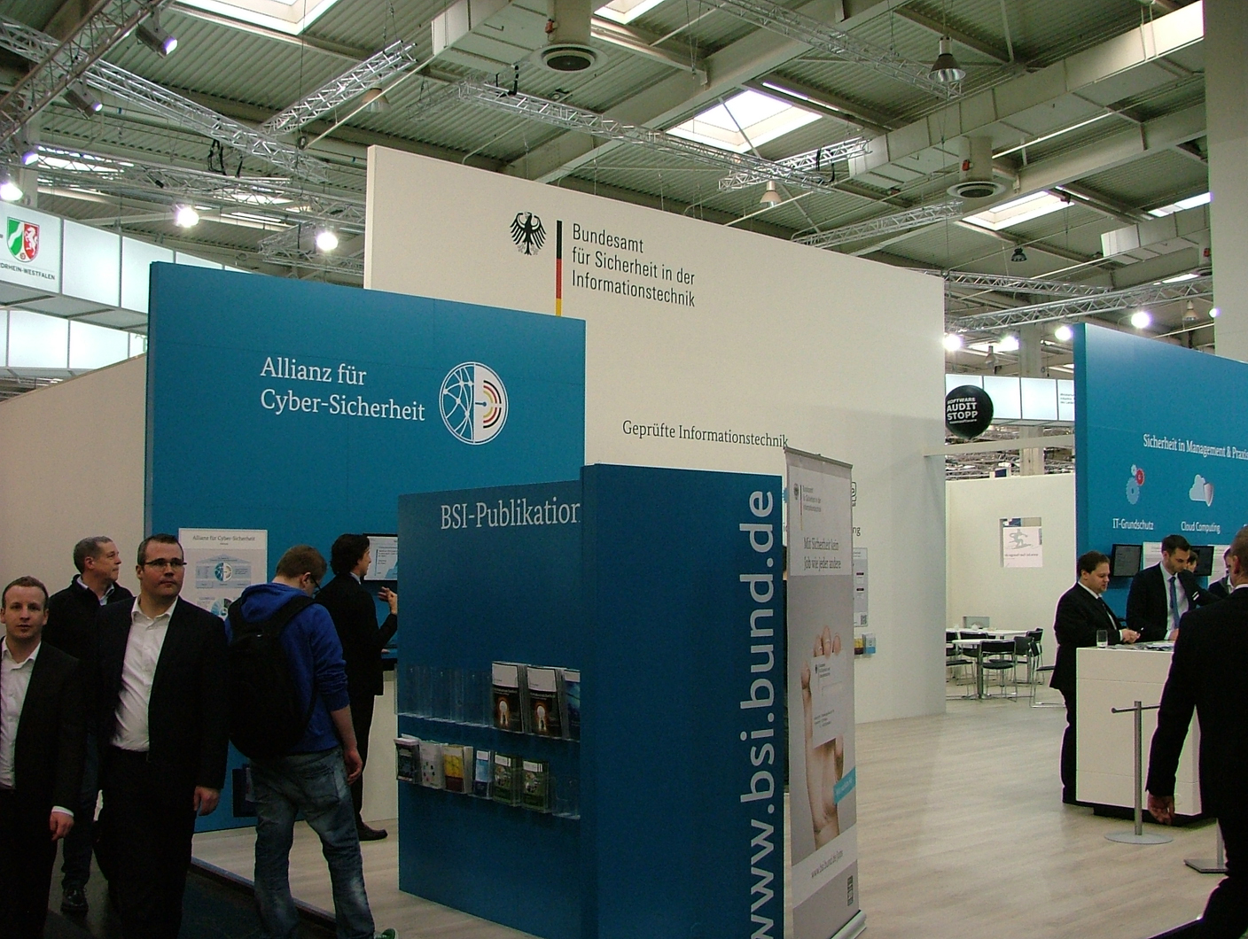 CeBIT 2015 in Hannover